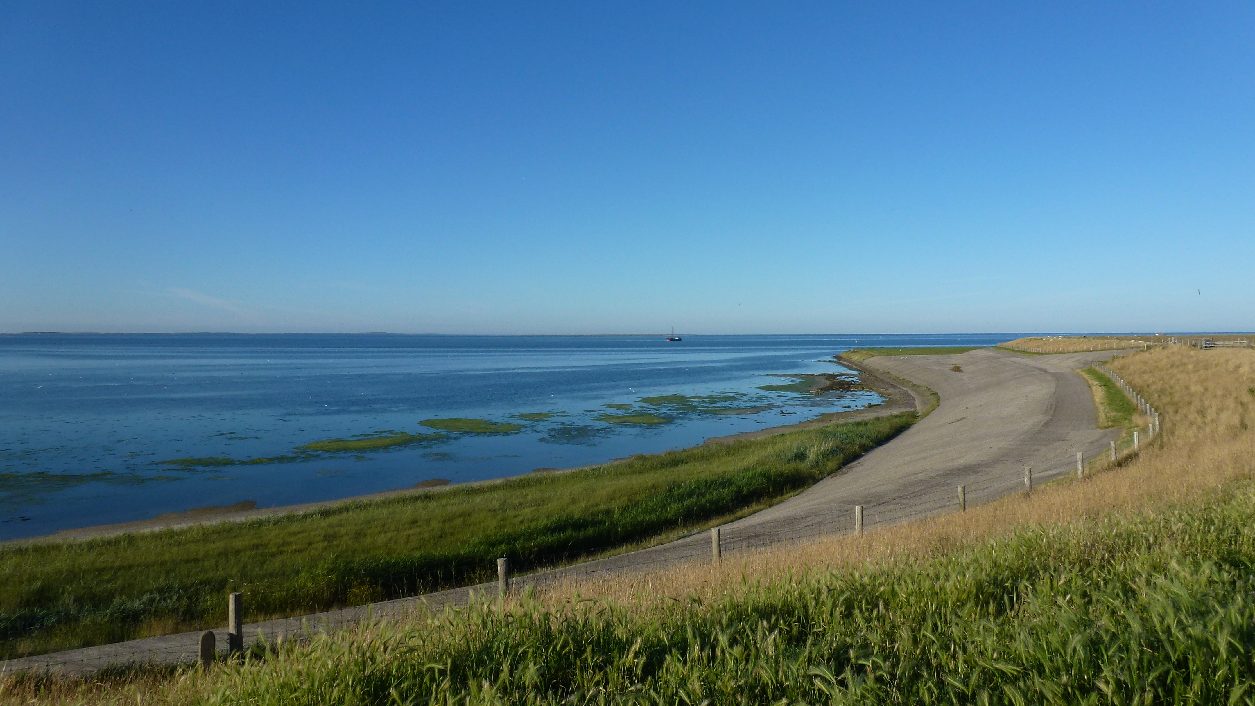 Zicht op de Waddenzee vanaf de Lancasterdijk (Polder De Eendracht) bij de splitsing met de Stengweg. Lancasterdijk is genoemd naar de Lancaster vliegtuigen die tijdens de 2e Wereldoorlog werden gebruikt.